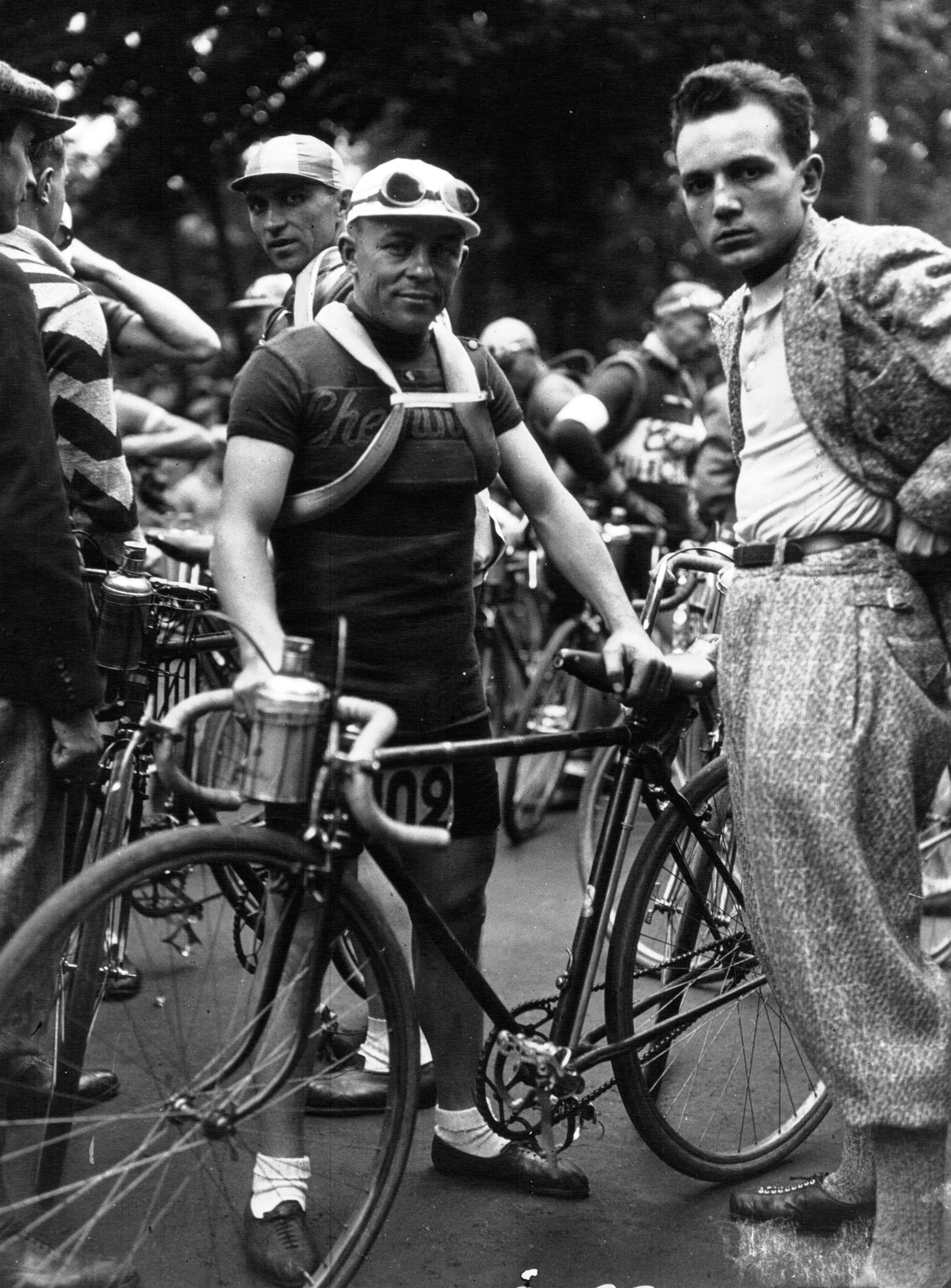 Benoit Faure lors du Tour de France 1932